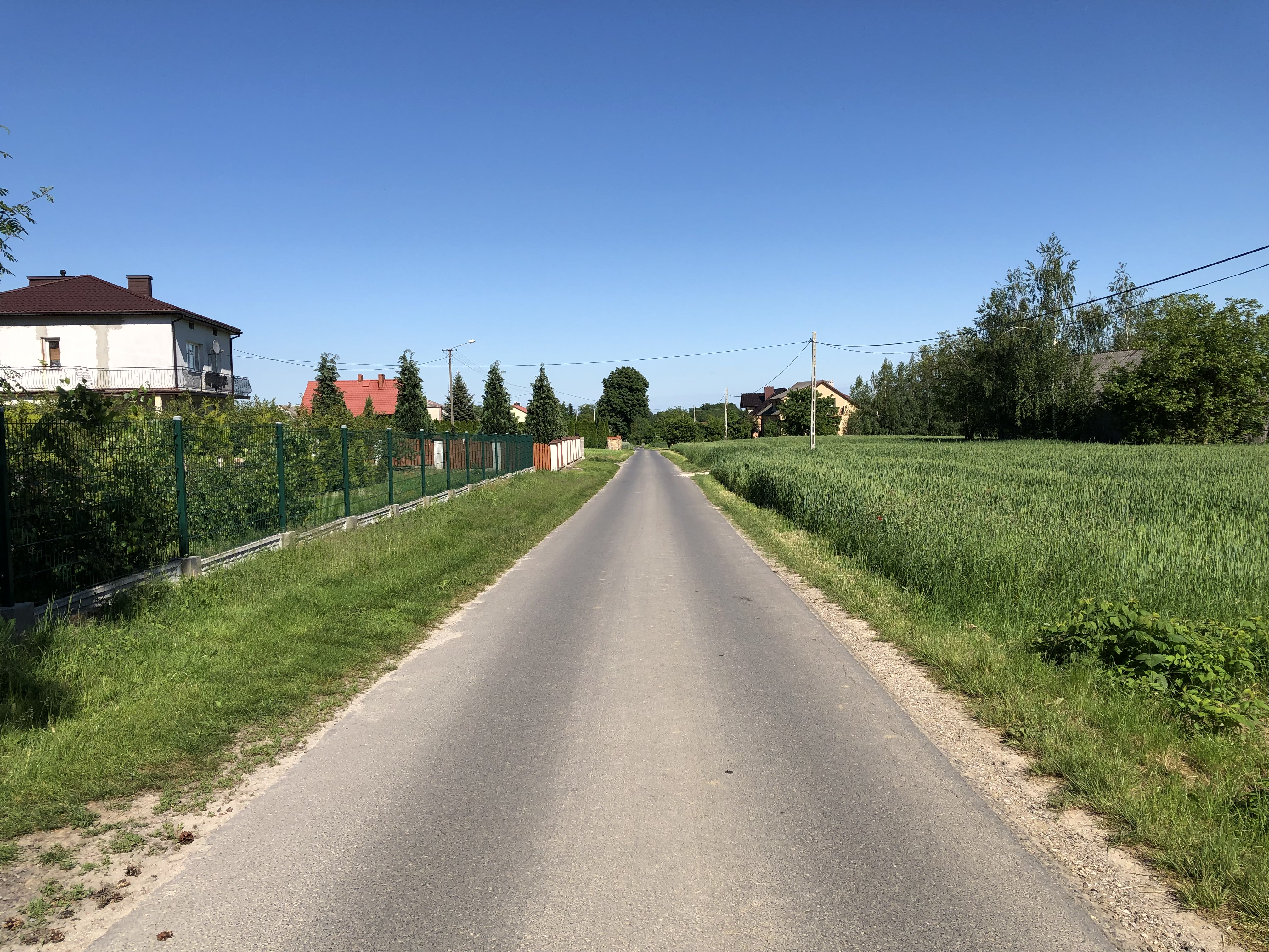 Droga asfaltowa w Czernikowie Opatowskim